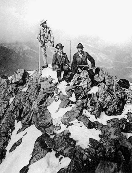 Johann Coaz au sommet de la Bernina le 13/09/1850